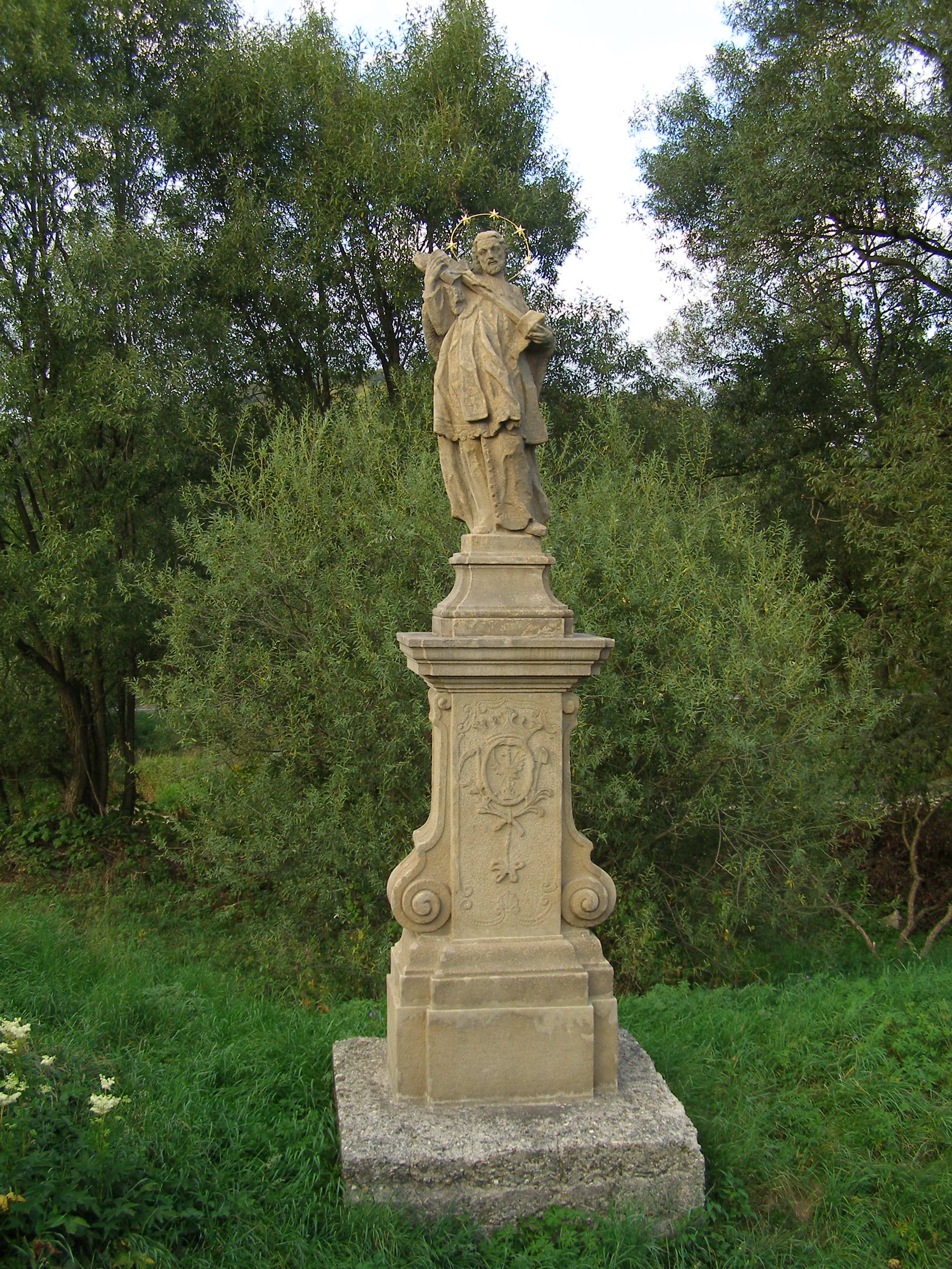 Socha sv. Jana Nepomuckého (Ústí), na hrázi řeky Bečvy, Ústí